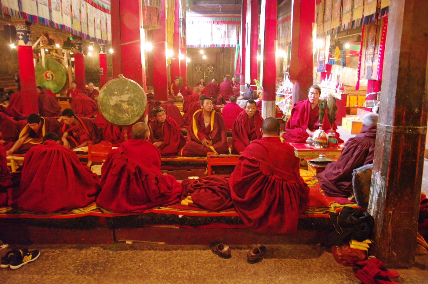 Zeremonie in der Versammlungshalle Tsuglagkhang